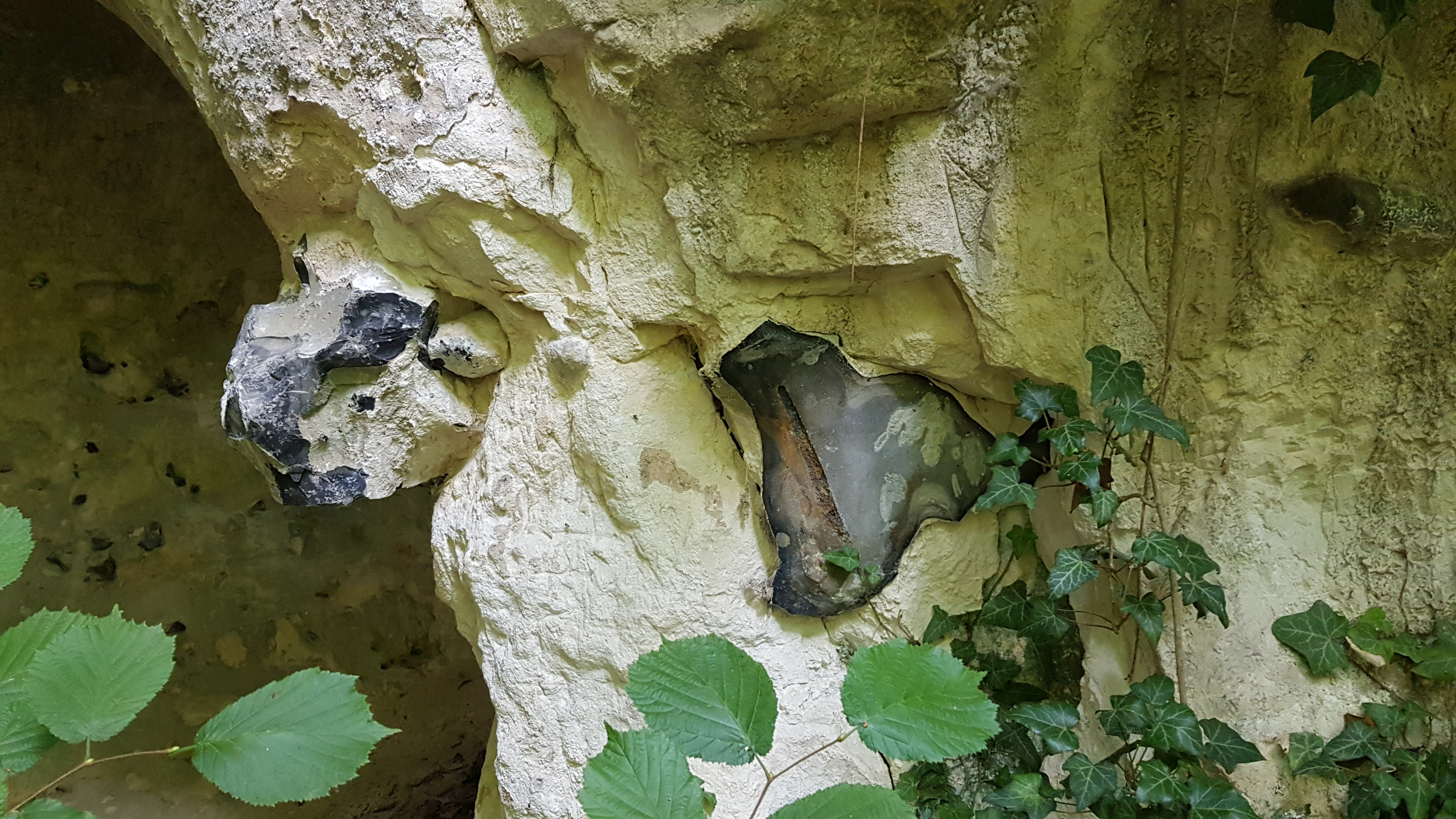 Abri van Rijckholt in Savelsbos, Rijckholt, Nederland